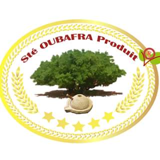 شعار شركة أوبافرا